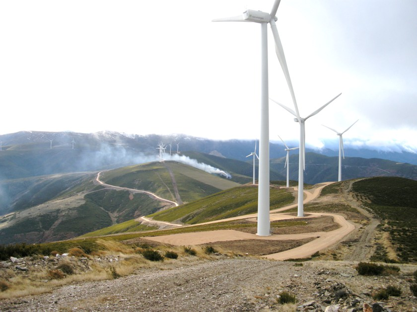 molinos de viento